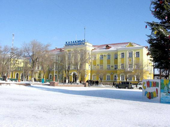 Im Zentrum des alten Dschesqasghan. Gebäude der "Kasachmys"-Verwaltung Public Domain